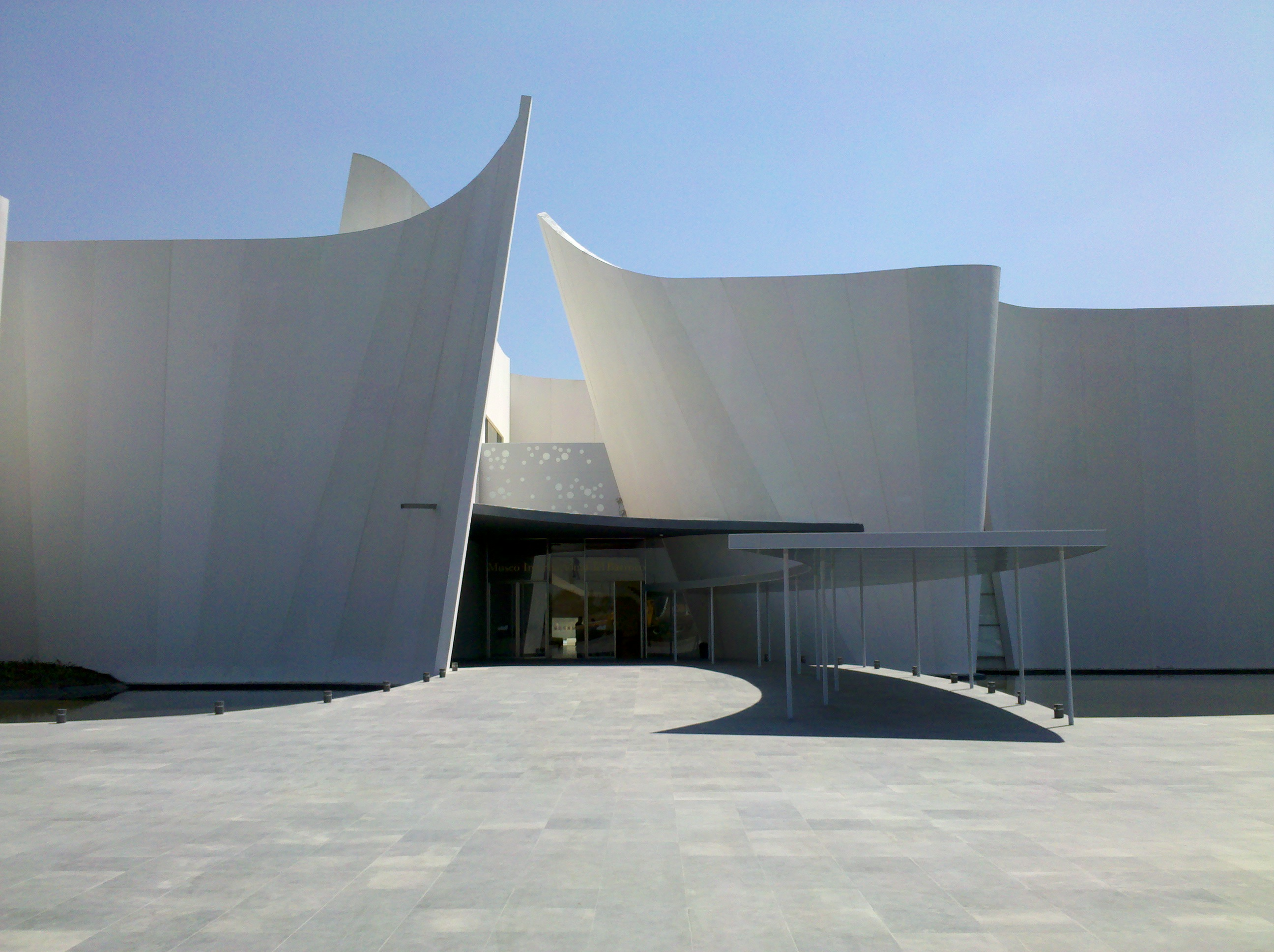 Entrada al Museo Internacional del Barroco en Puebla, México. Reserva Territorial Atlixcáyotl 2501.